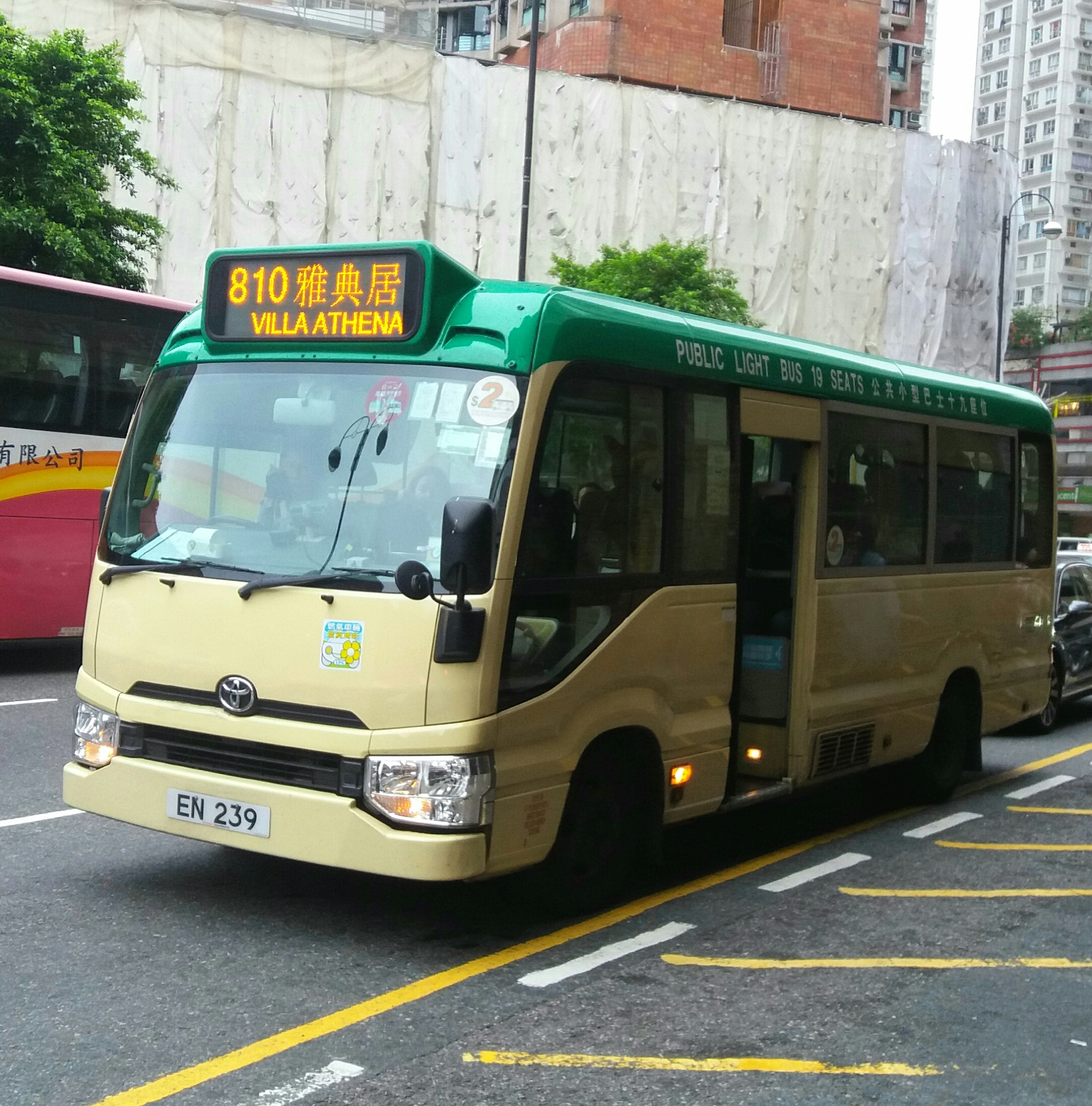 中文（香港）: 新界區專線小巴810線